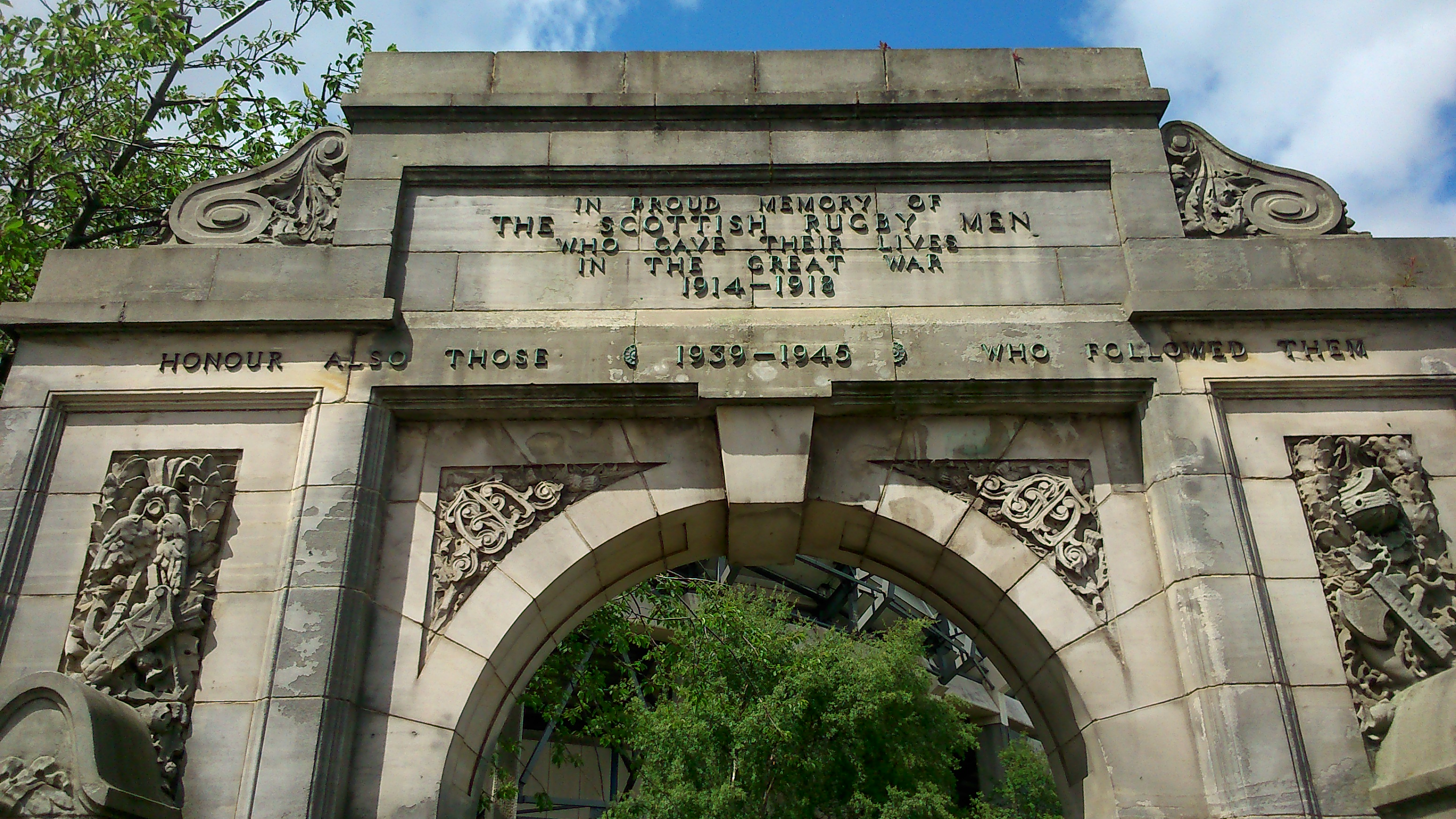 Memorial Arche Murrayfield Stadium Scottish Rugby Union Remembrance Eric Milroy and marcel Burgun - Auld Alliance Trophy Zoom haut